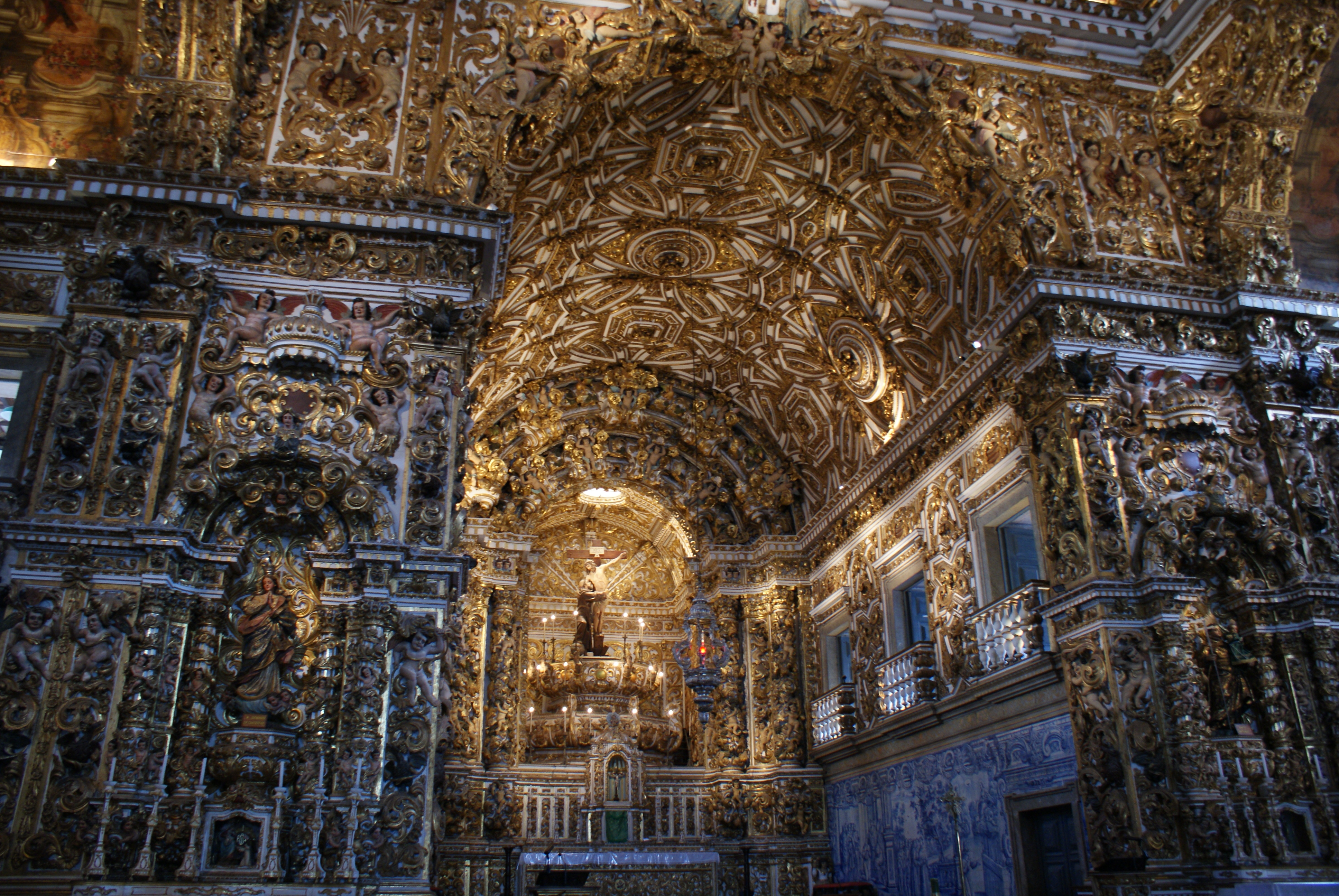 Igreja de São Francisco (Salvador)